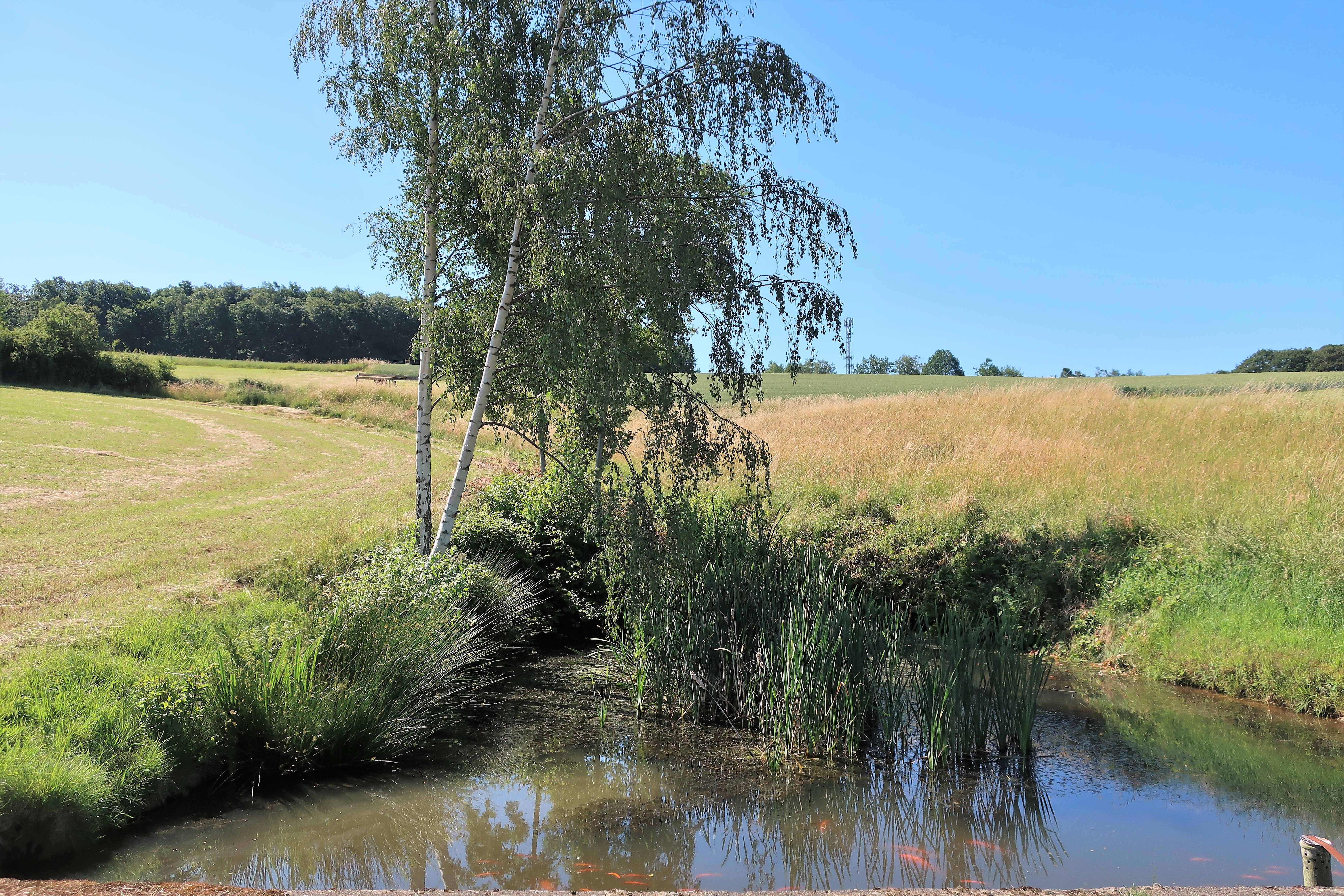 Geschützter Landschaftsbestandteil 1.4.2.69 „Feuchtgebiet Kattenohl“ in Hagen, an der Straße nach Endte. Es handelt sich um eine Wiese mit Teich und gehölzbestandenen Böschungen im Osten von Kattenohl.